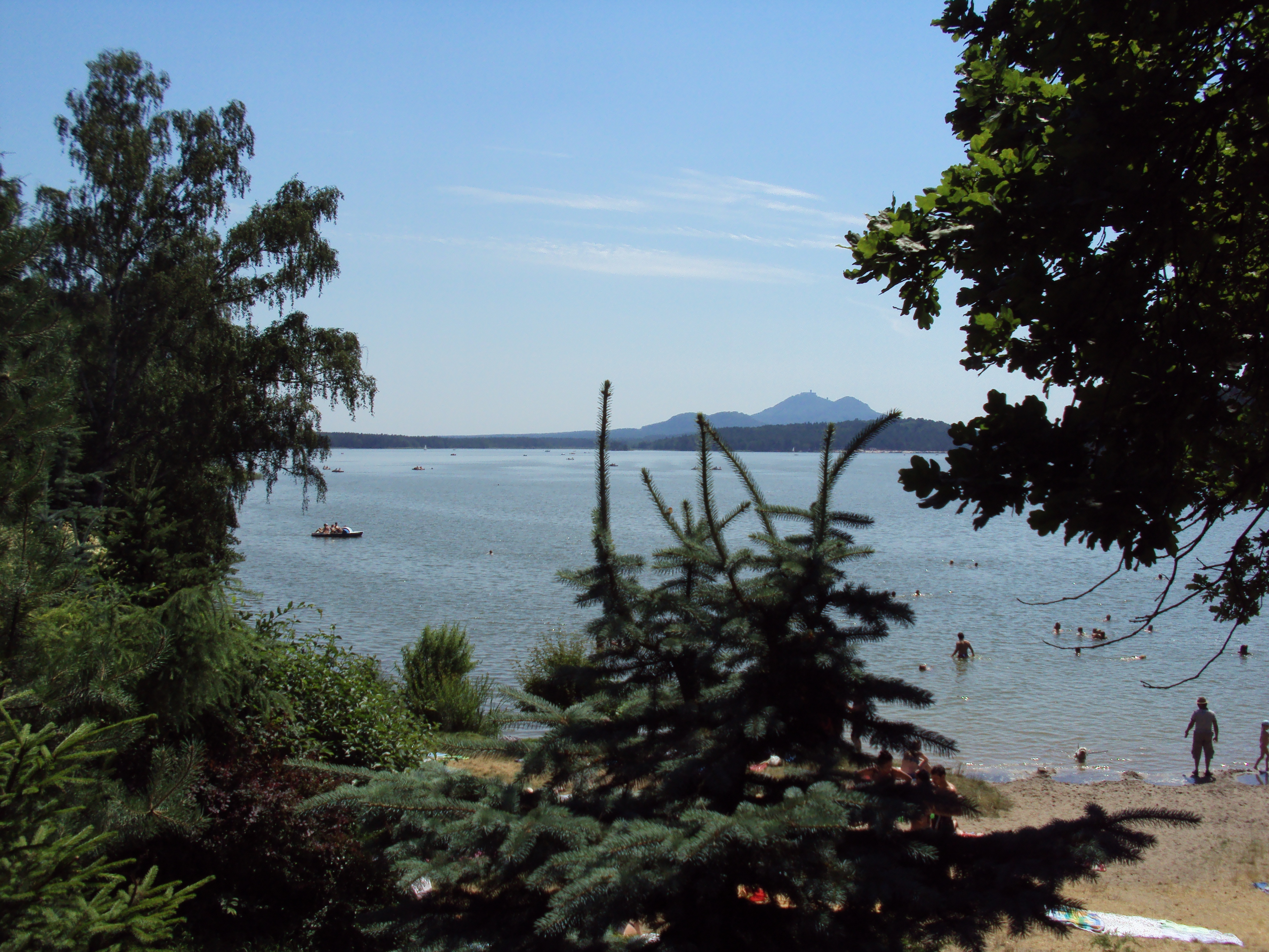 Máchovo jezero, pohled od SZ břehu na konci Starých Splavů